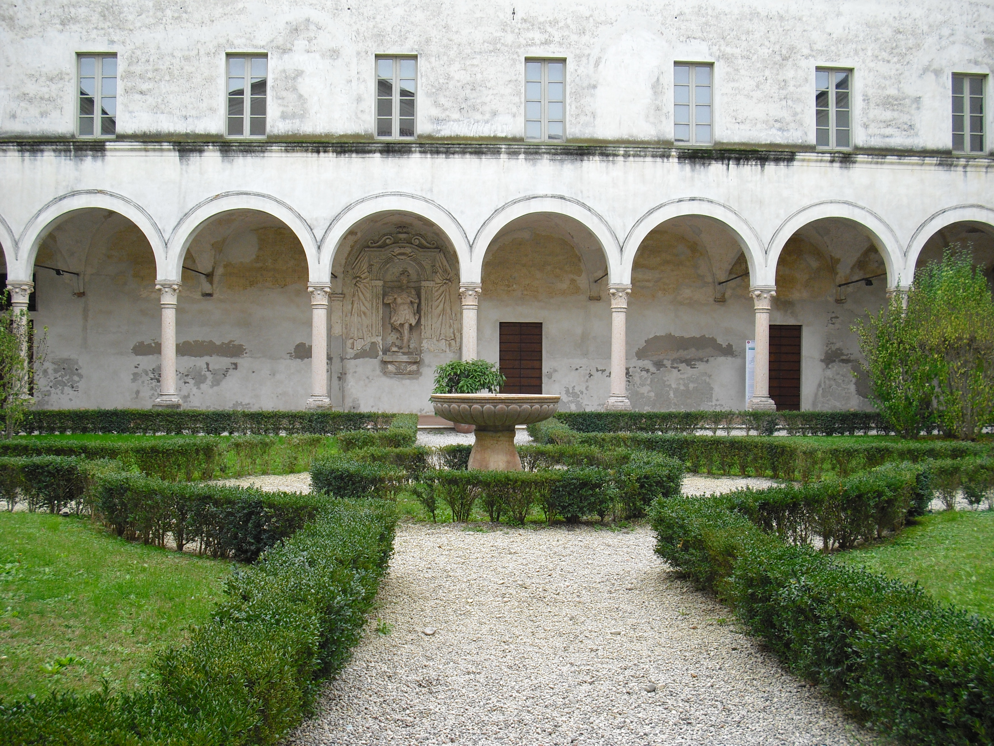 Chiostro dell'Abbazia di Polirone